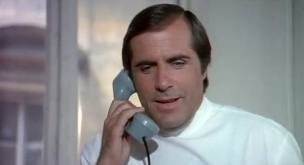 Screenshot del film Il trafficone di Bruno Corbucci - 1974